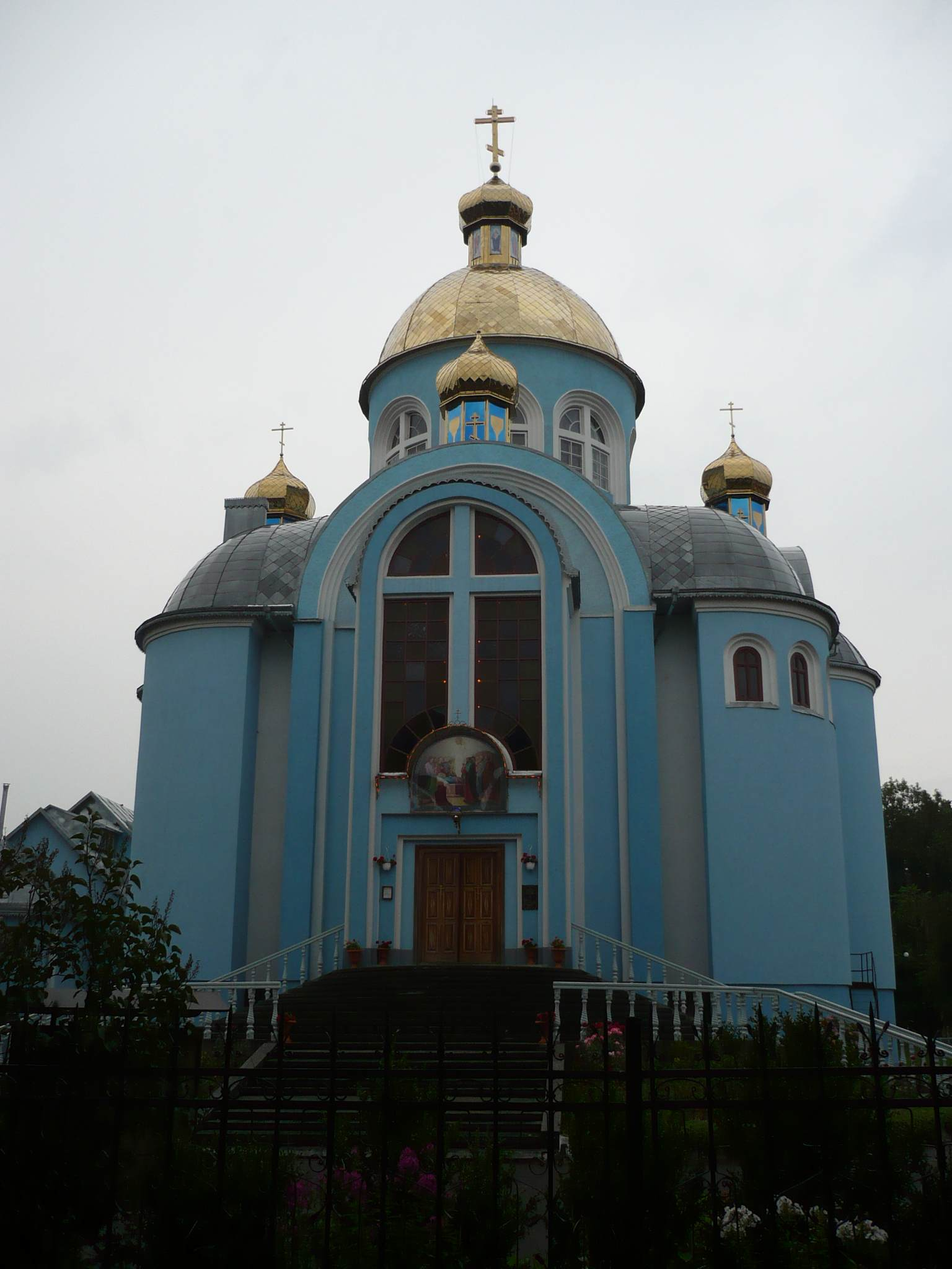 Kołomyja, cerkiew, 2009 r.